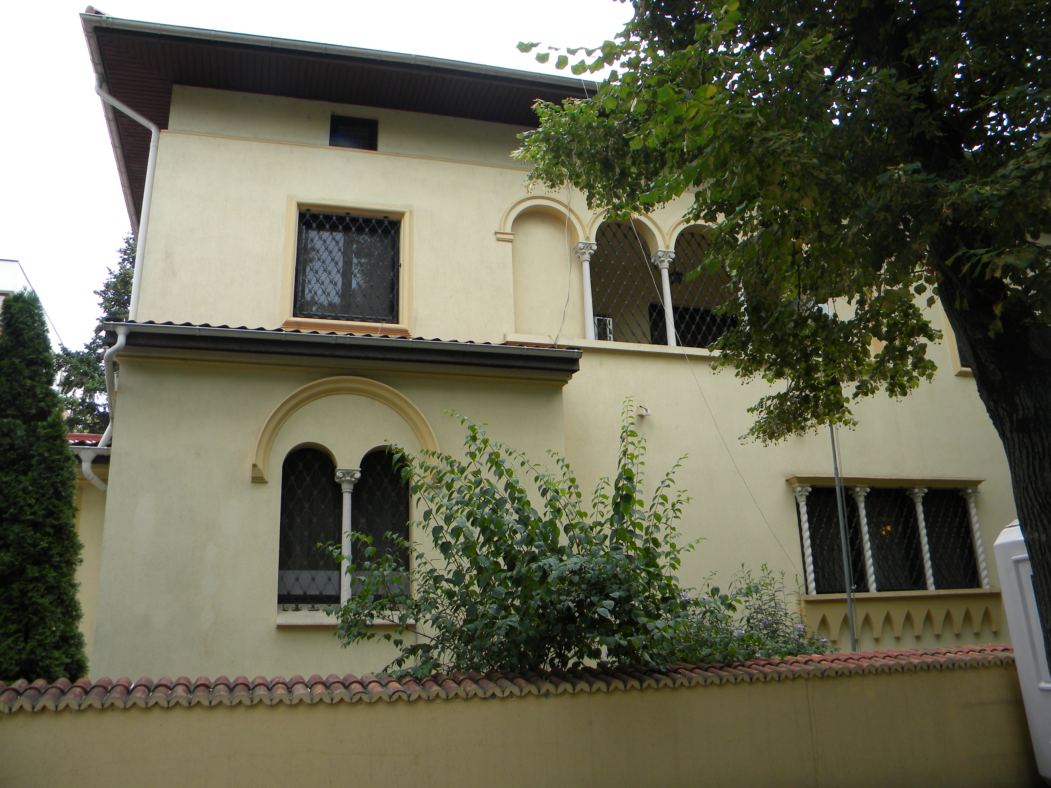 Imobil pe Bd. Aviatorilor, nr. 46, Bucuresti sect. 1